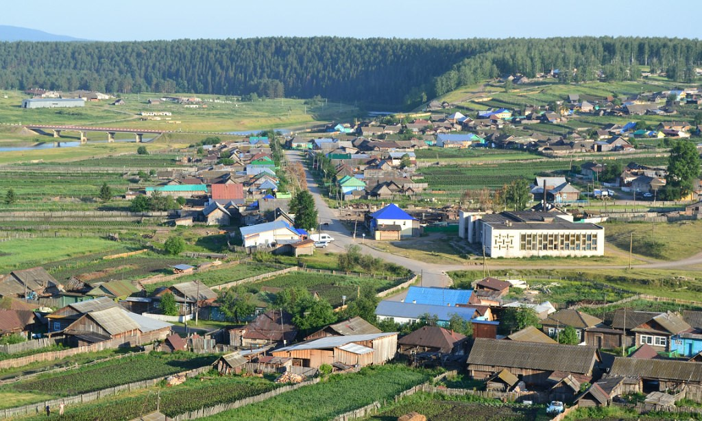 Река Уфа, Челябинская область, Нязепетровский район, ООПТ. Село Арасланово.